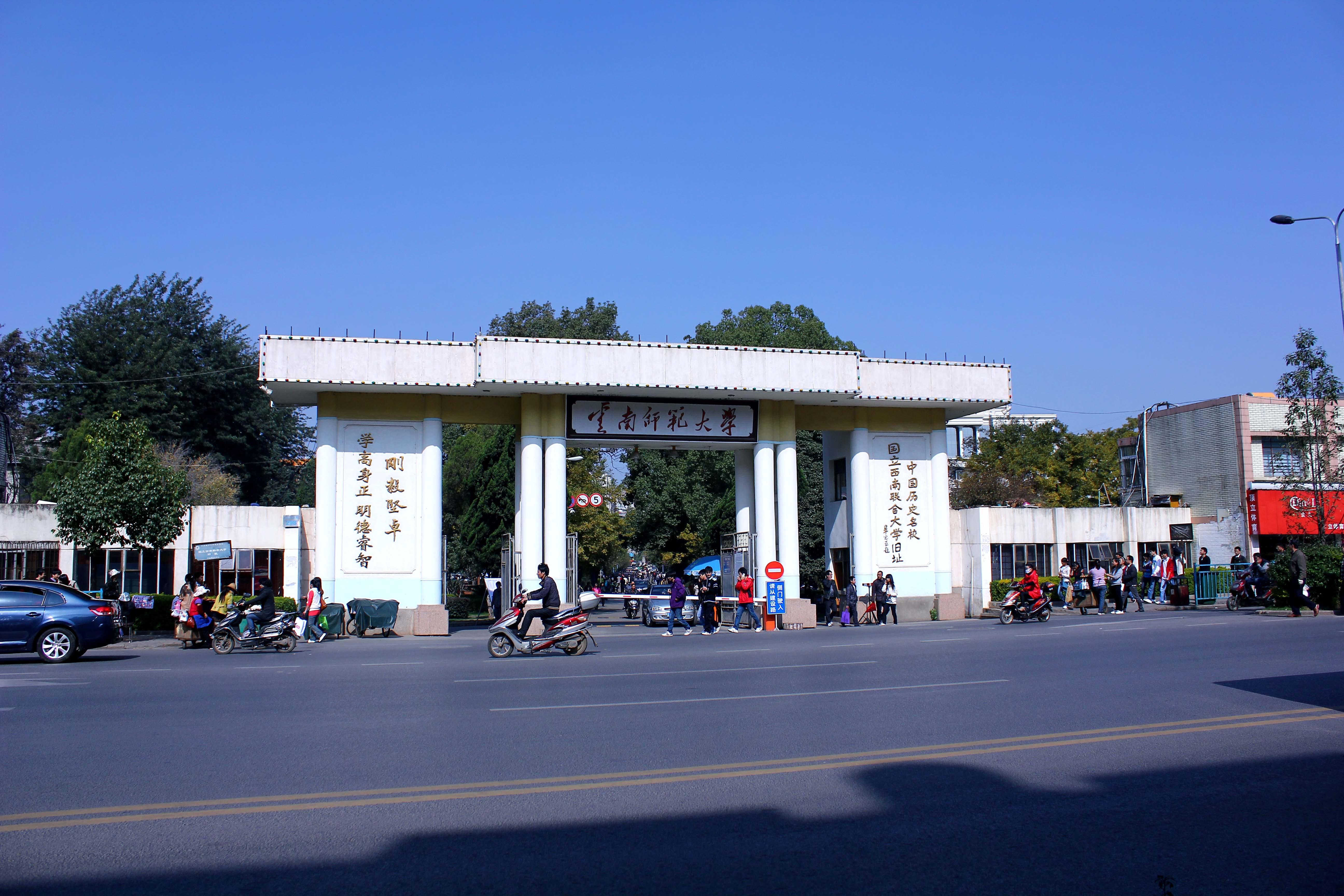 云南师范大学校本部（一二一校区）正大门